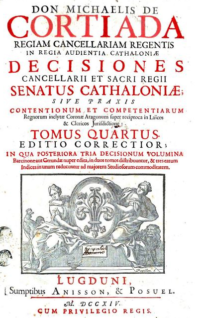 Frontis del tom IV de les Decisiones Cancellarii Et Sacri Regii Senatus Cathaloniae: Sive Praxis Contentionum Et Competentiarum Regnorum